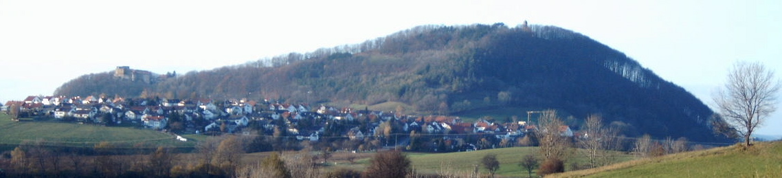 Der Rechberg von Südosten